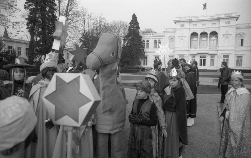 Bundespräsident Karl Carstens empfängt Sternsinger